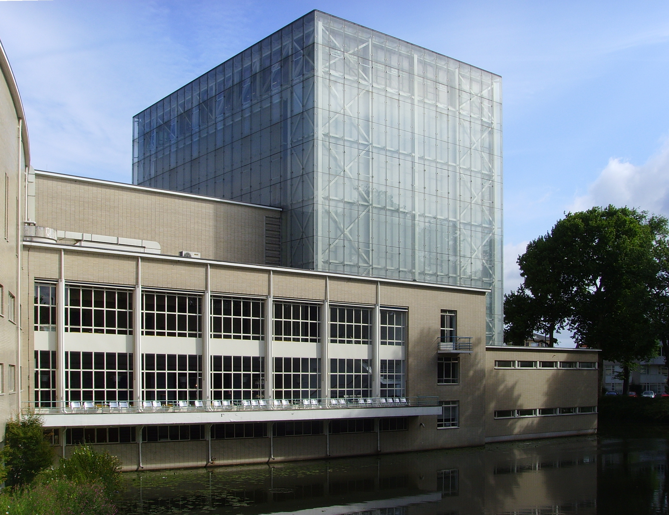 Achterzijde van de Utrechtse Stadsschouwburg aan het Lucasbolwerk, met onderaan de Wittevrouwensingel. De glazen doos is de grote Douwe Egberts- zaal, de ramen op de voorgrond behoren tot de foyer